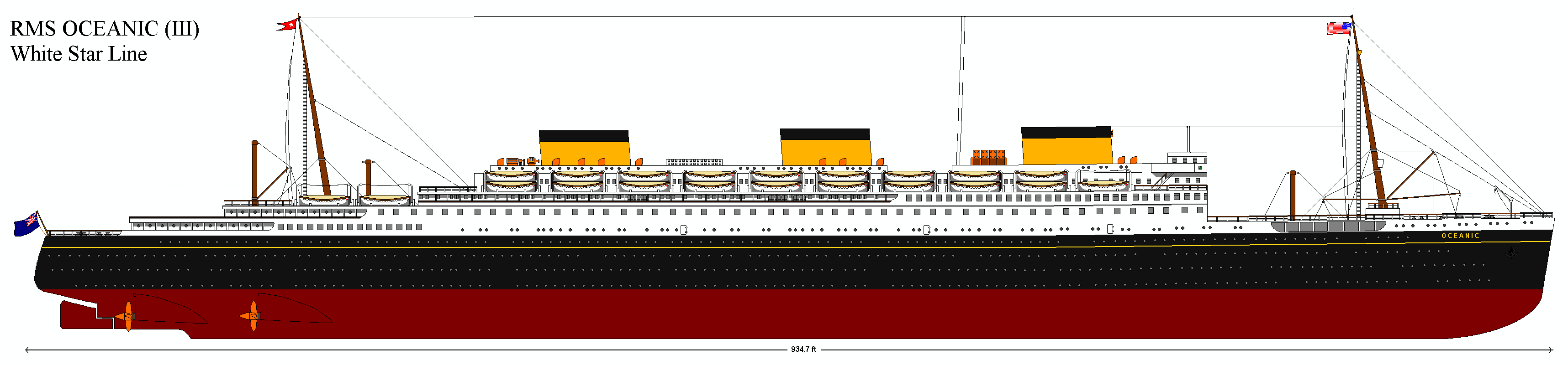 Приблизительный внешний вид непостроенного тртьего Океаника УСЛ